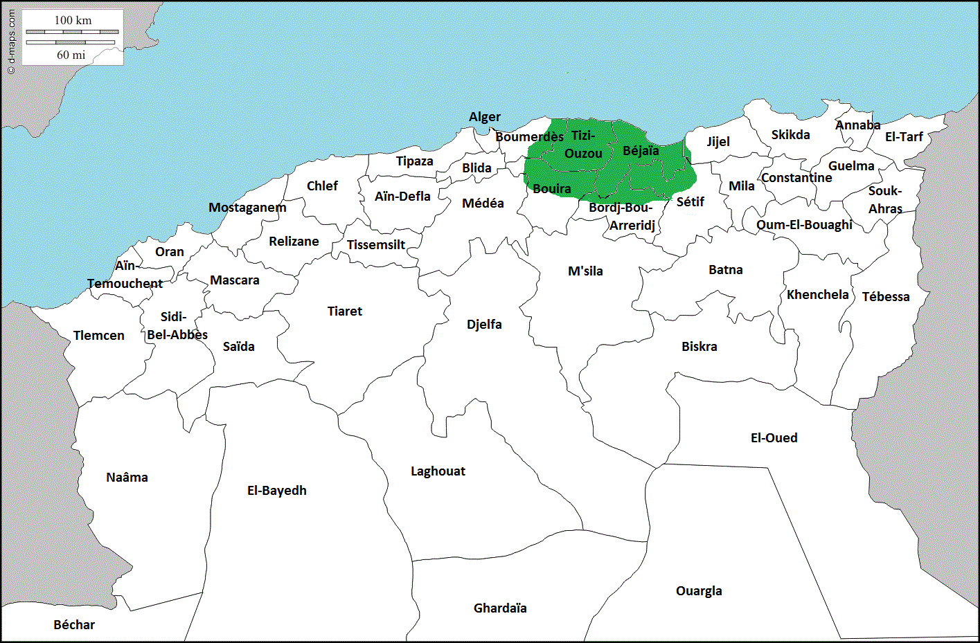 situation de la Kabylie en Algérie du Nord